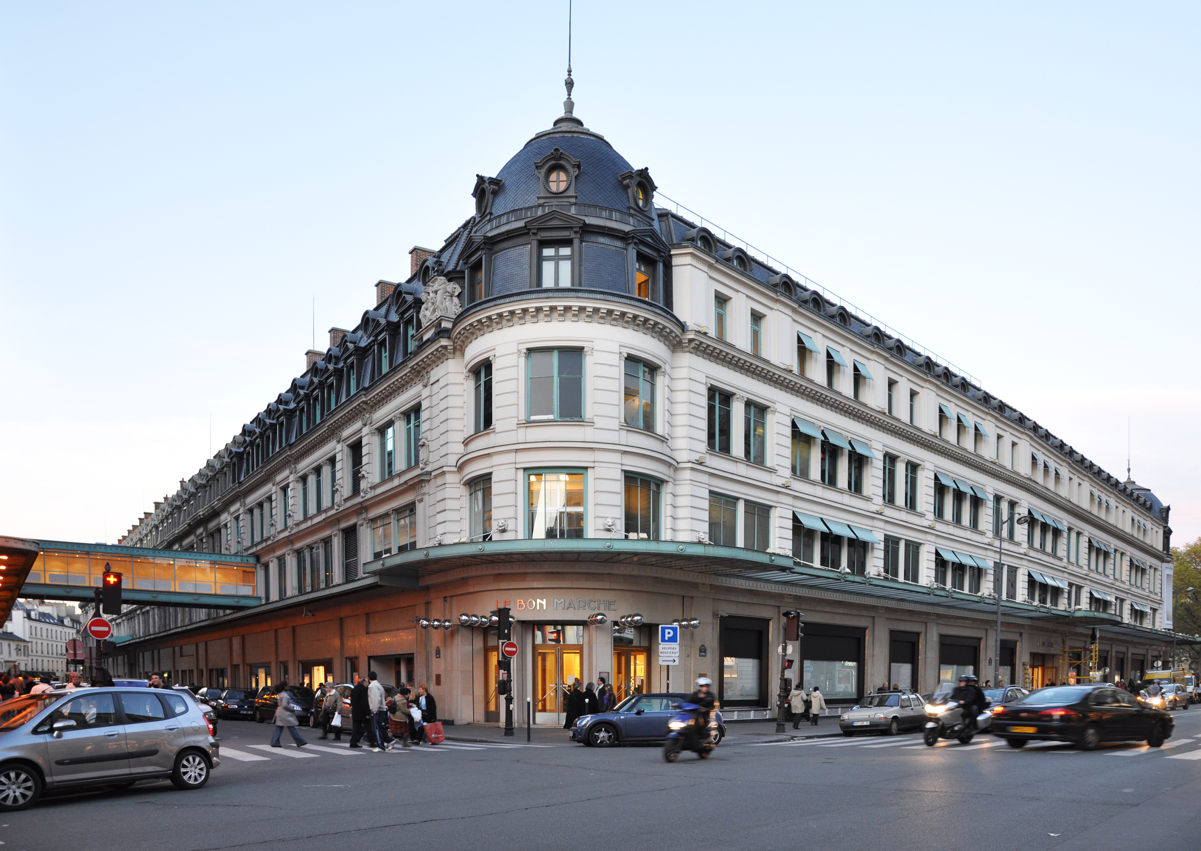 ボンマルシェ